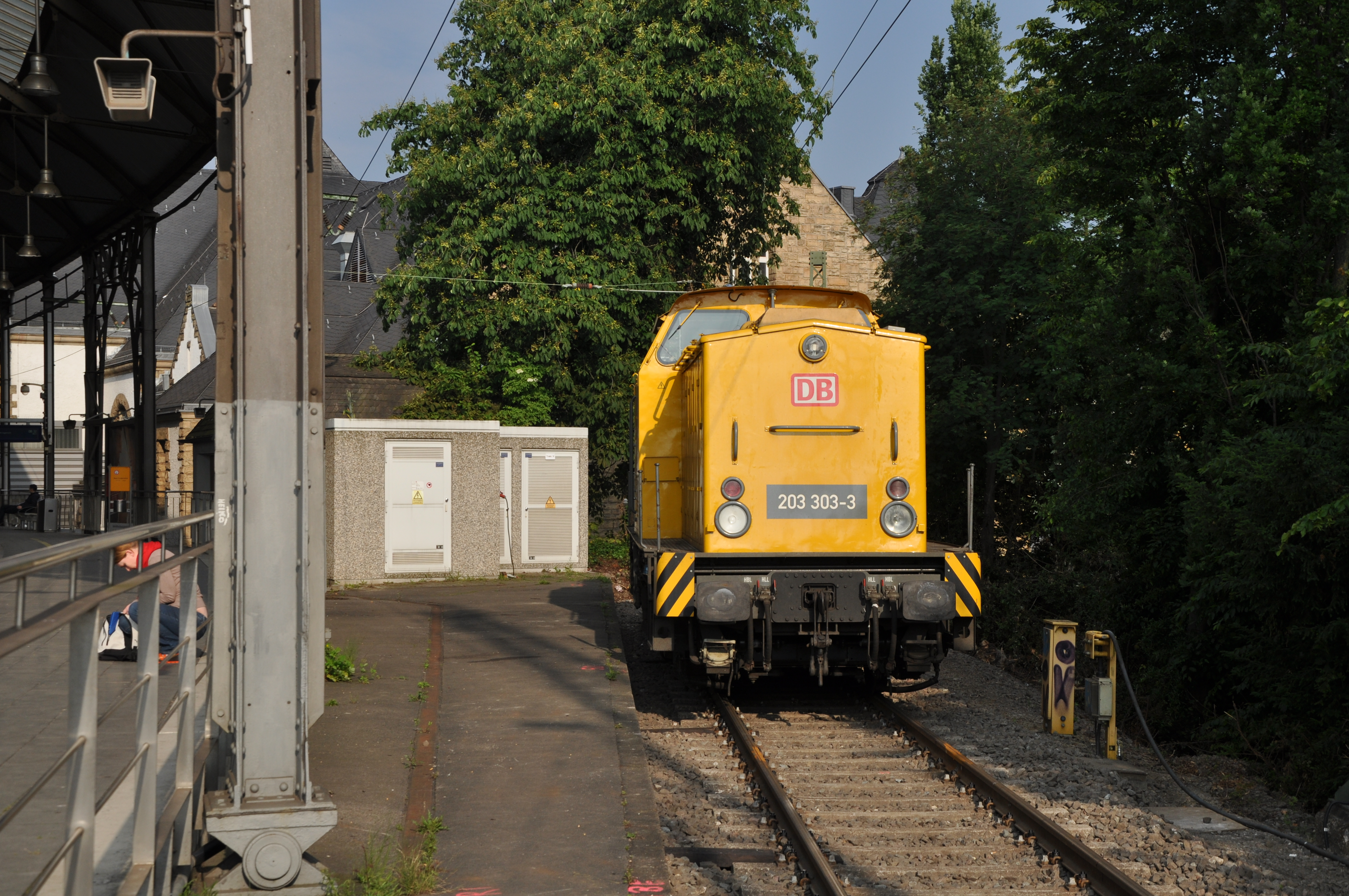 Nördlich Gleis 1 des Aachener Hauptbahnhofs werden häufig Bahndienstfahrzeuge abgestellt.